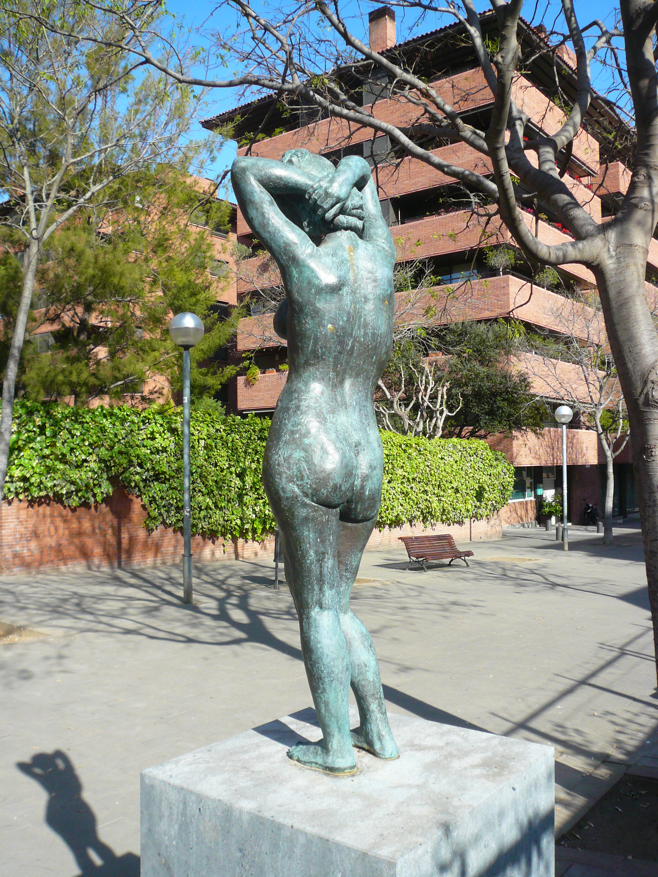 Alba, bronze de Martí Llauradó, a Barcelona.